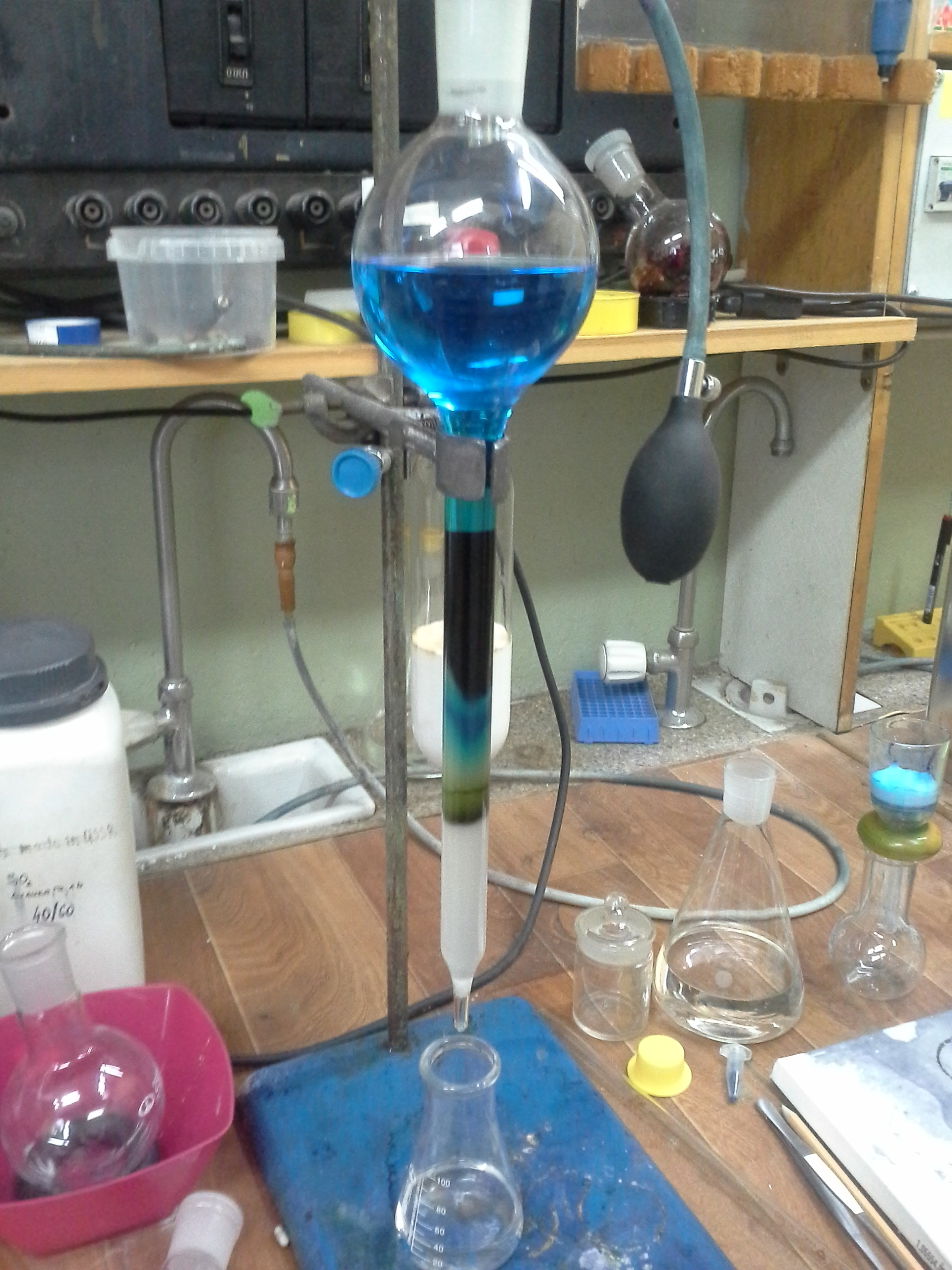 Blue column